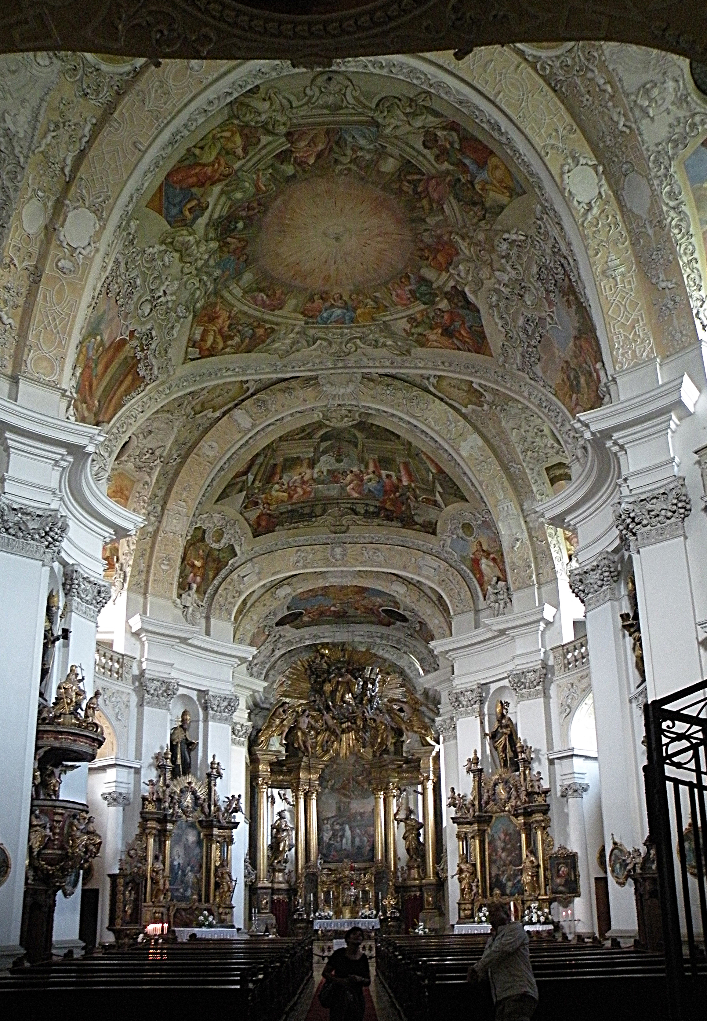 Неф церкви и его своды